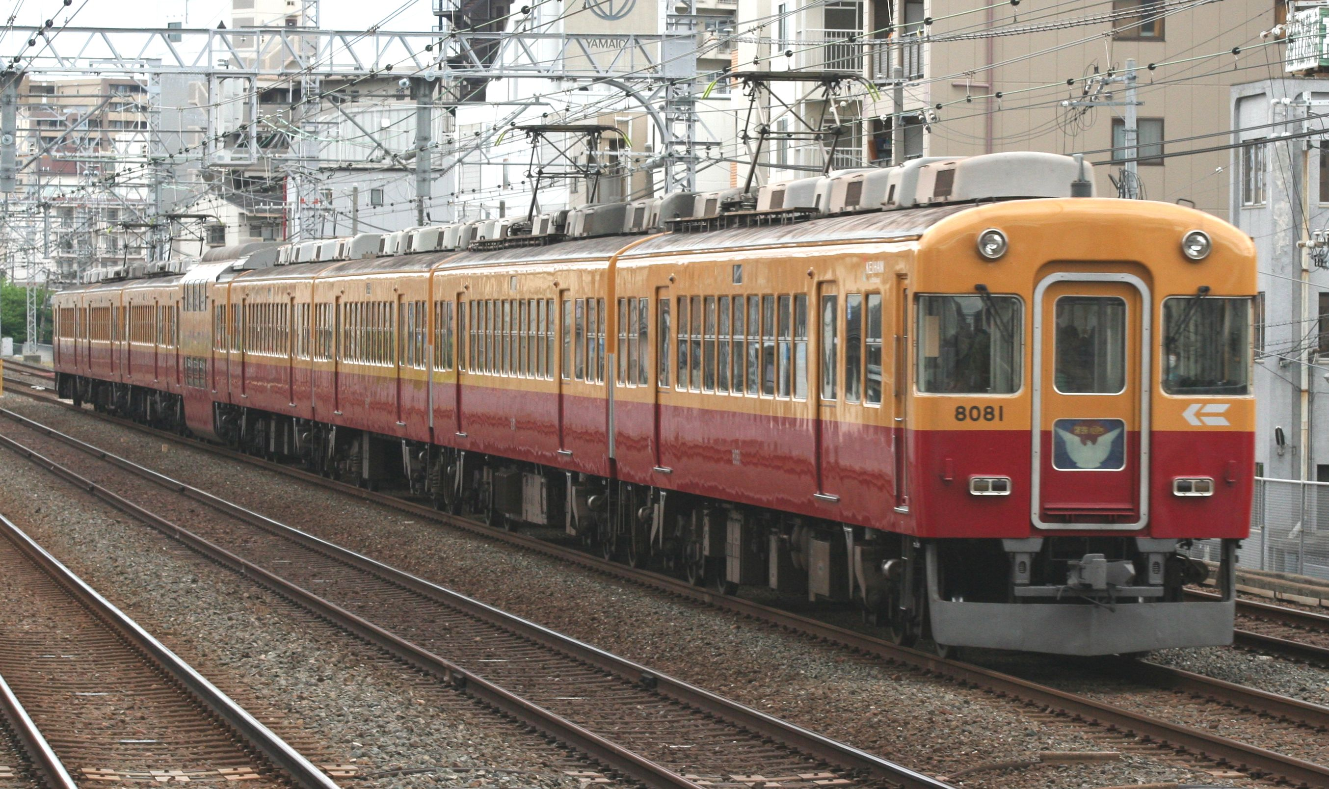 京阪3000系電車 (初代)